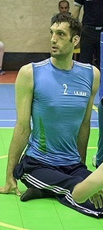 دیدار دوستانه تیم ملی والیبال نشسته ایران و آلمان